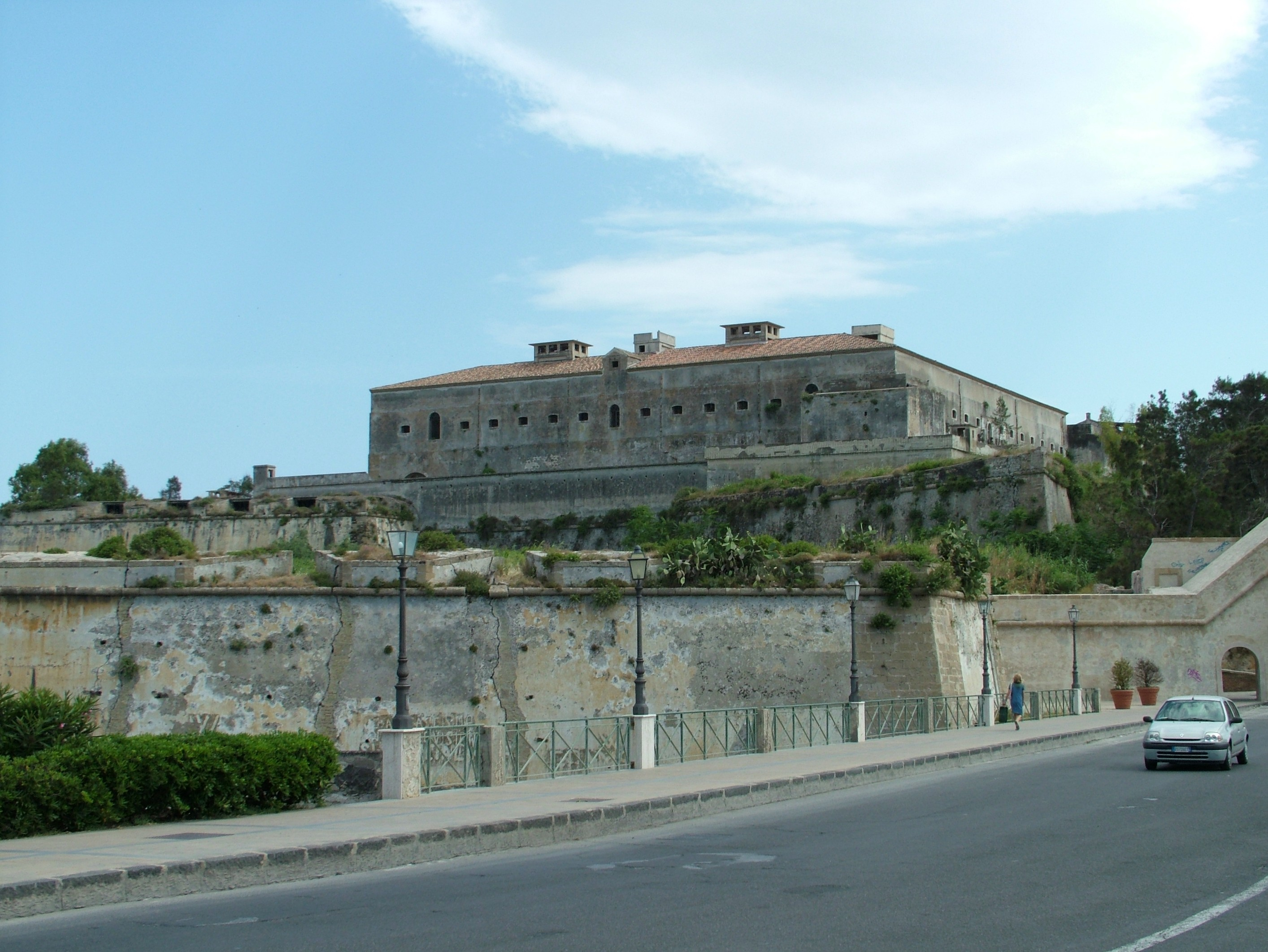 Augusta, Sizilien, Italien, Das Kastell